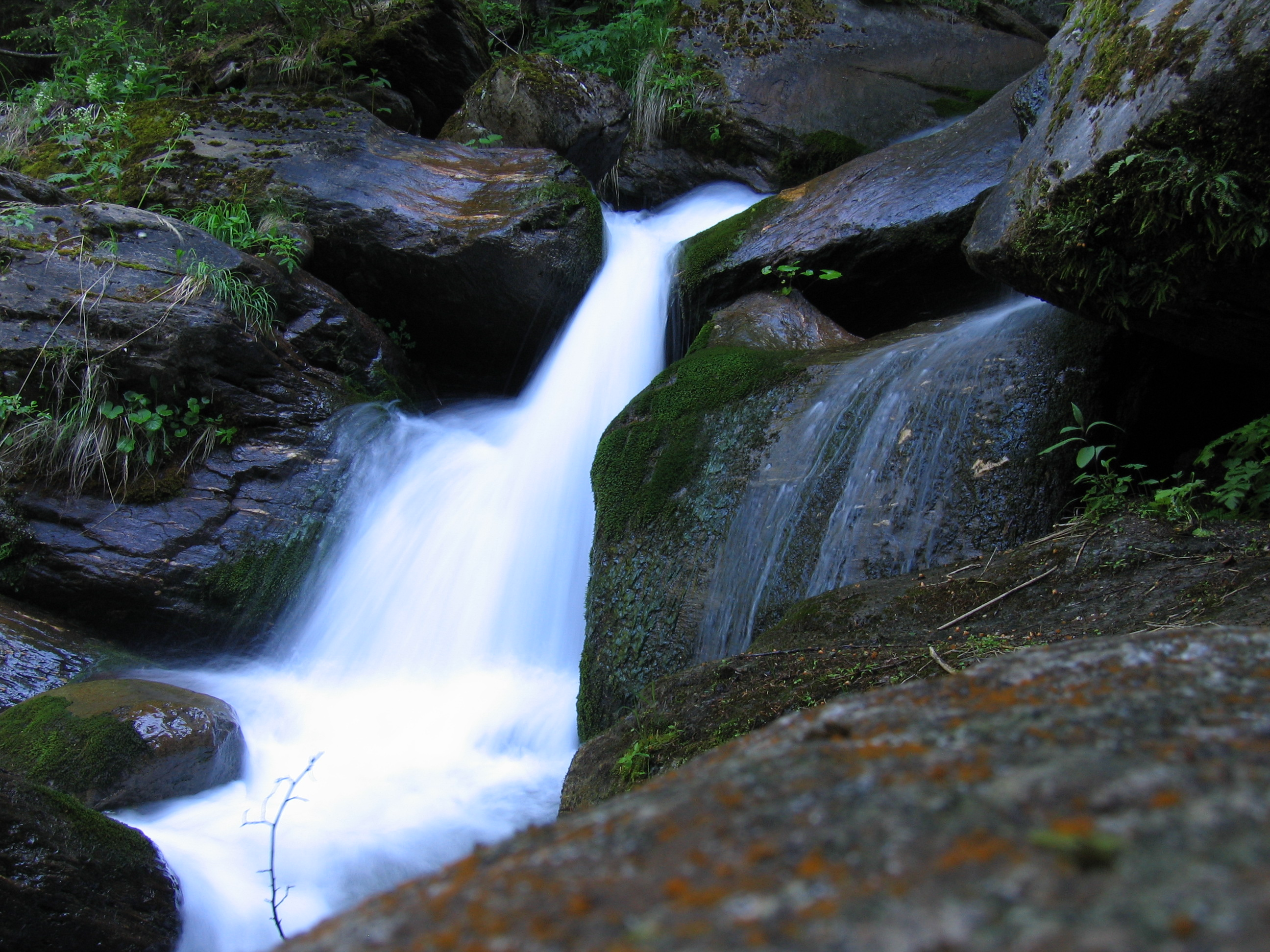 Klinzerschluch in Mühldorf